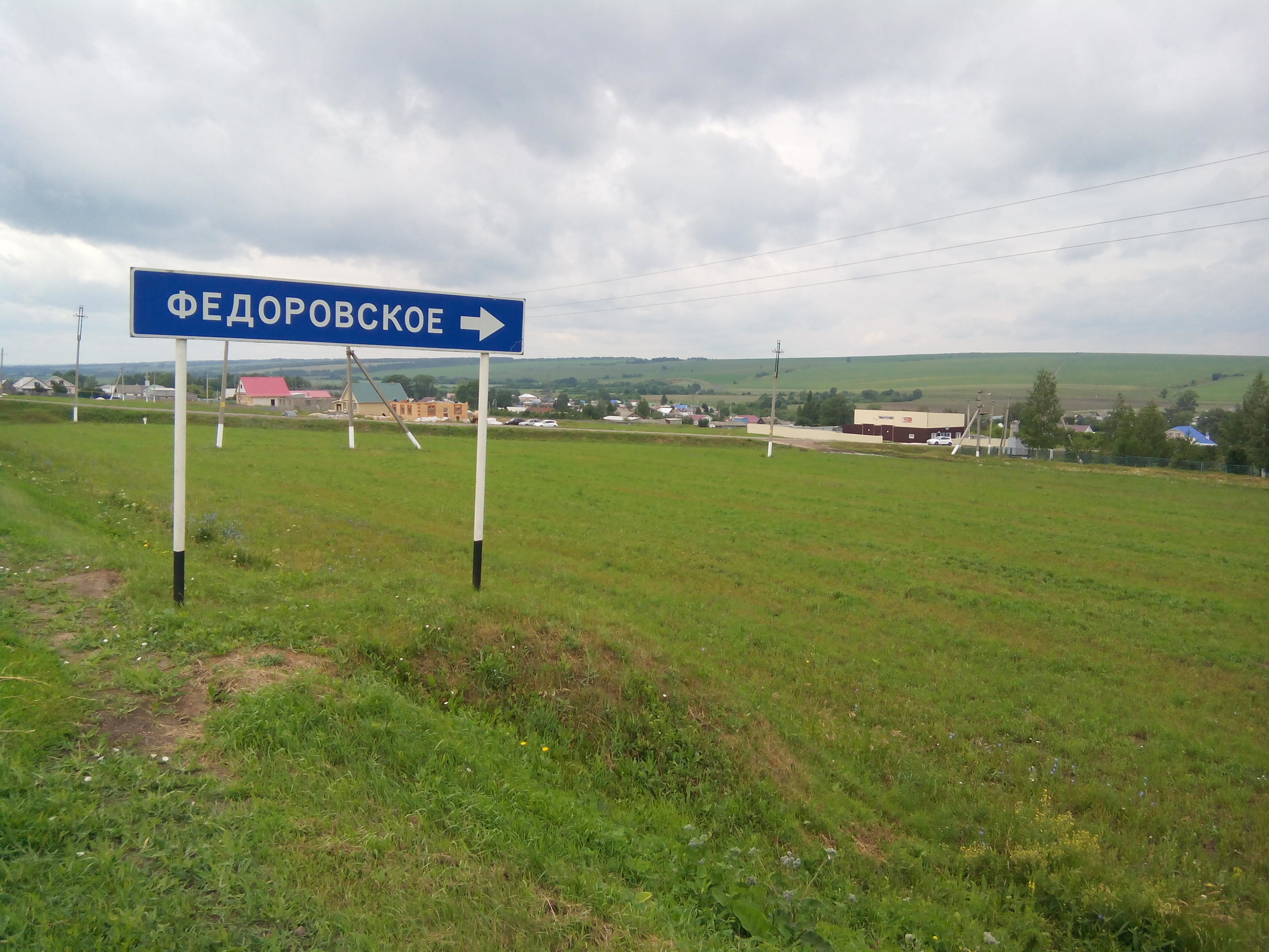 У деревни Федоровское